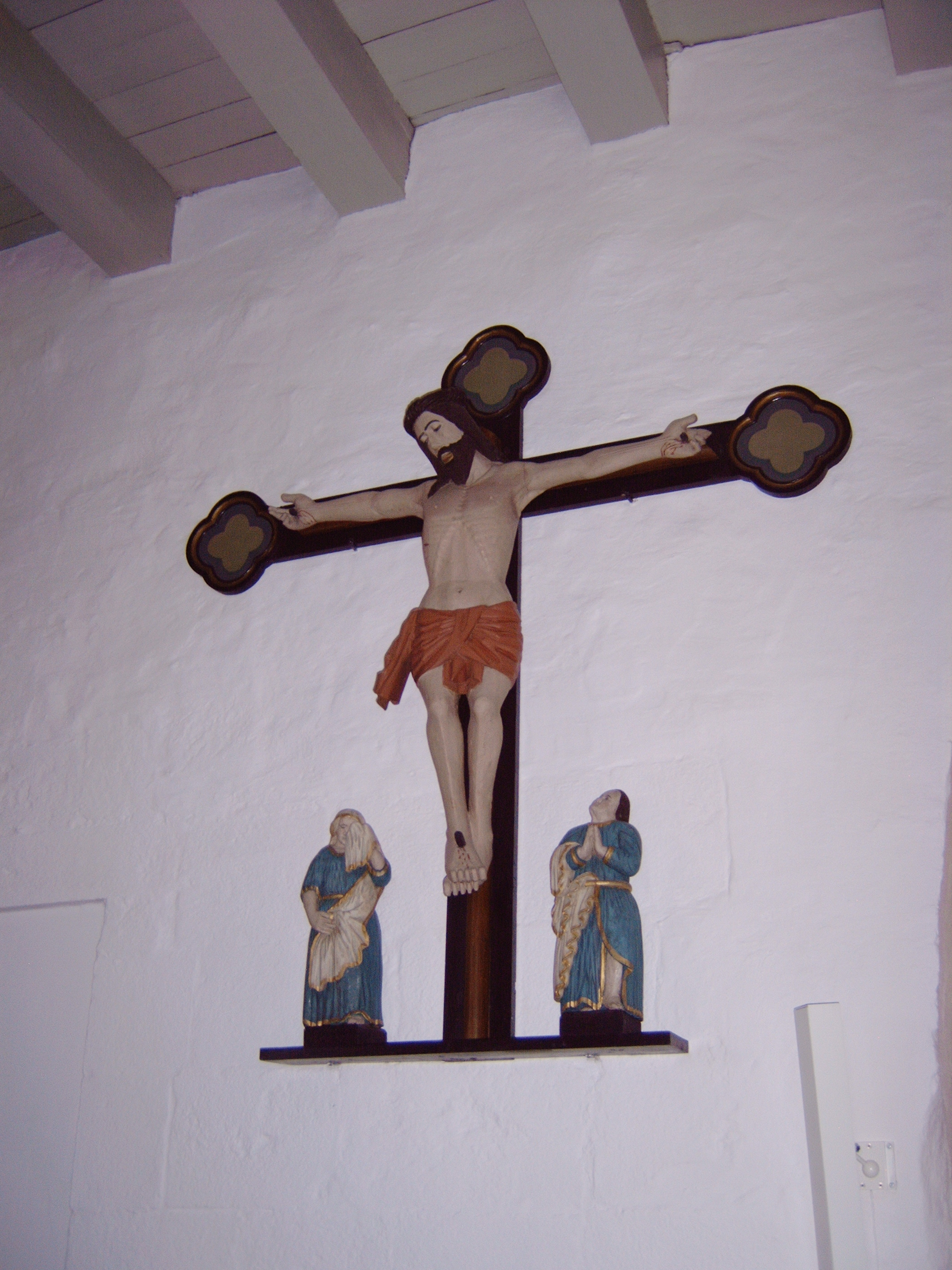 Hvidbjerg Kirke in Hvidbjerg Sogn in Struer Kommune, Denmark. Krucifiks. Photographer: Brams.